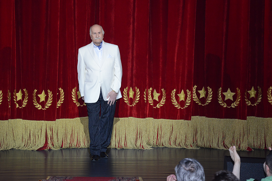 85-летие Центрального академического театра Российской армии